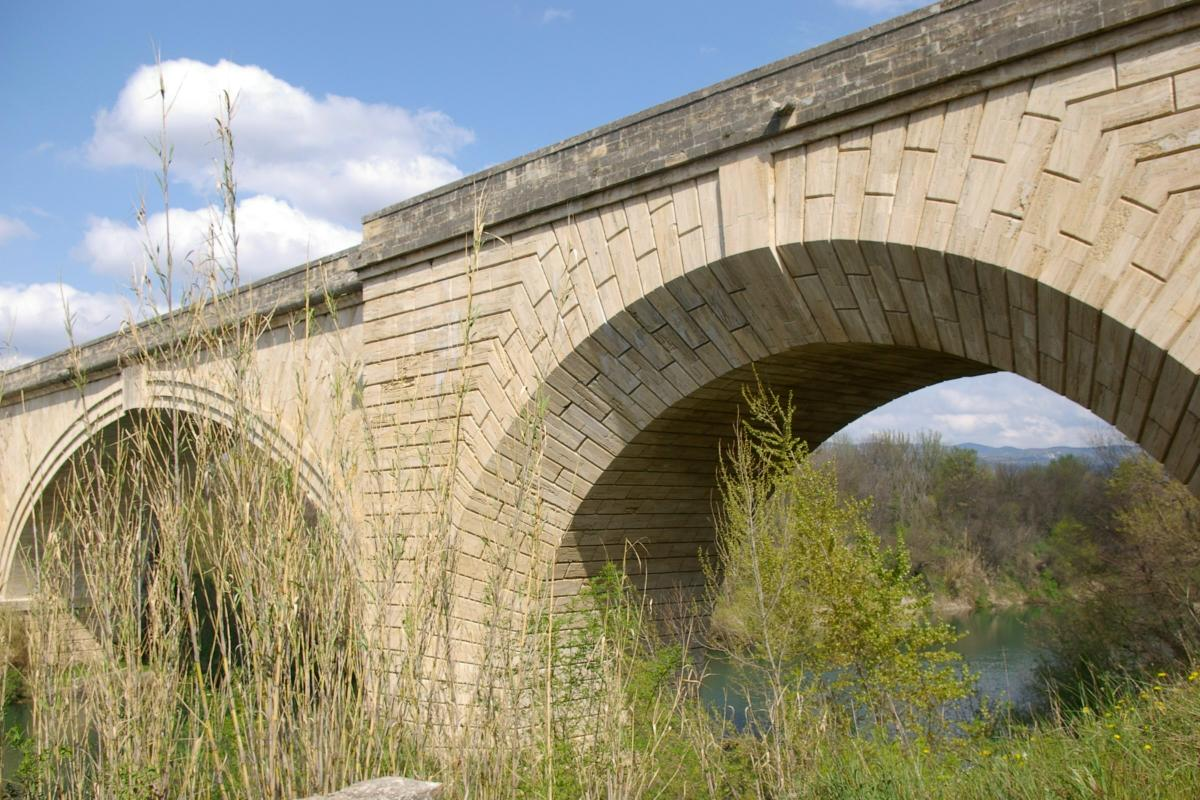 Gignac Bridge, Gignac, France